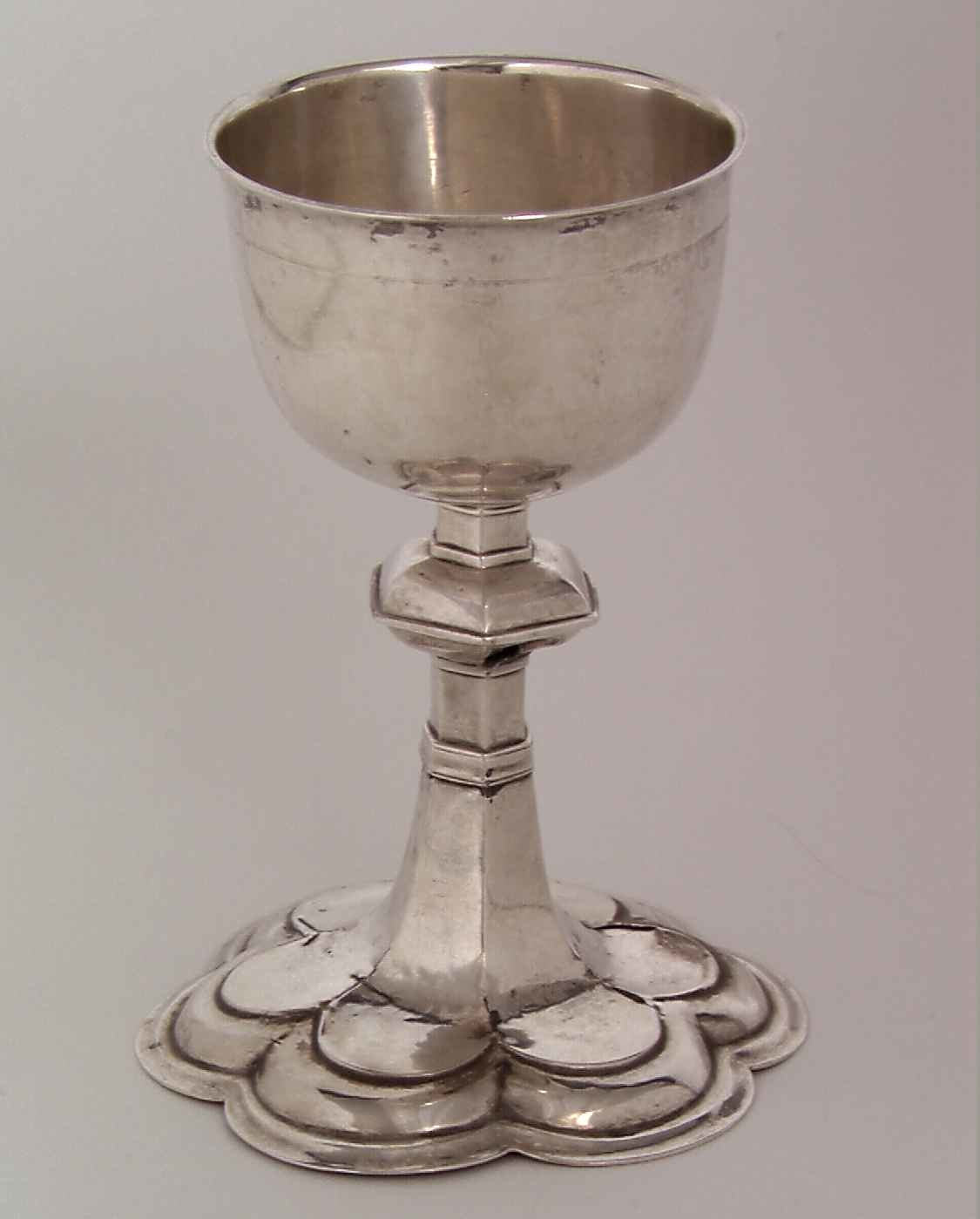 Alterkalk fra Os kirke, Rakkestad i Østfold